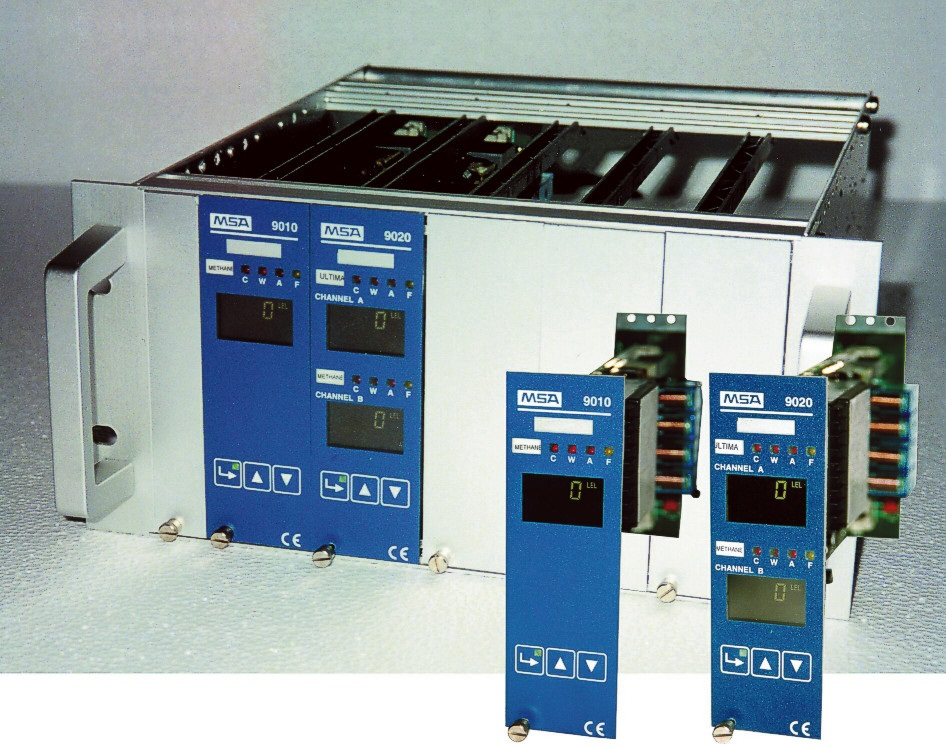 Gaswarnanlage 9010-9020